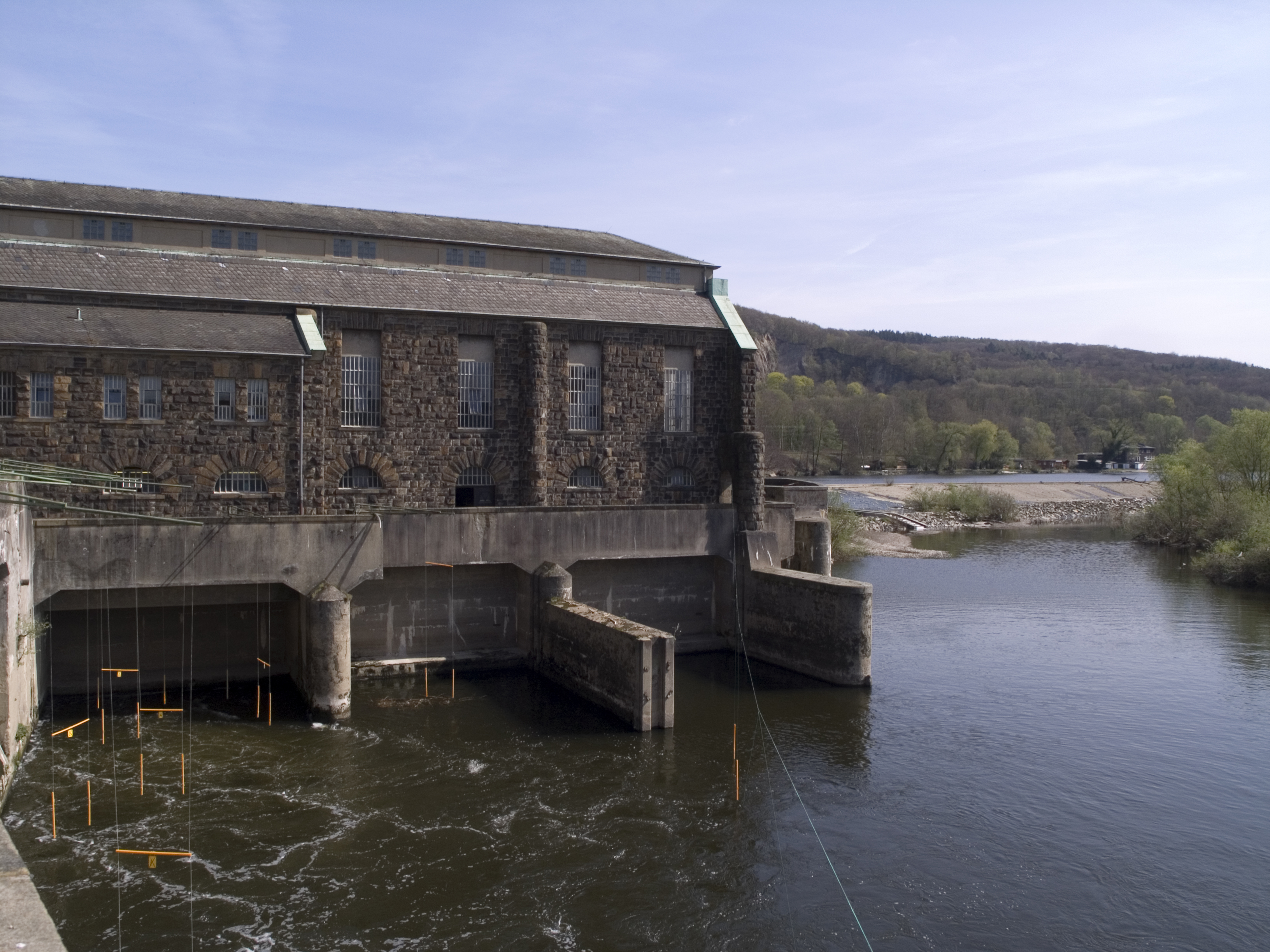 Северный Рейн - Вестфалия, Виттен - ГЭС Хохенштайн